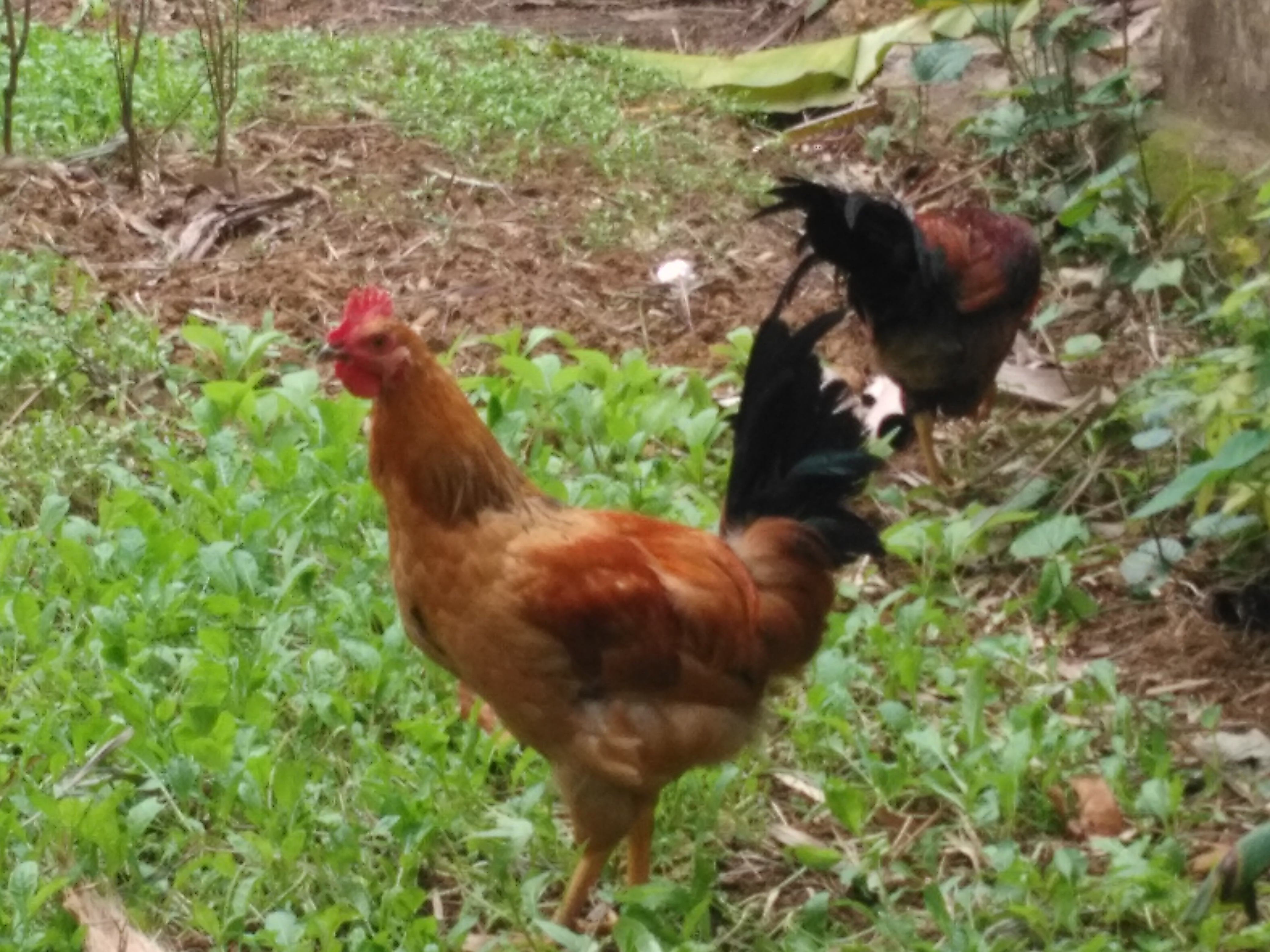 Gà ta vàng 4